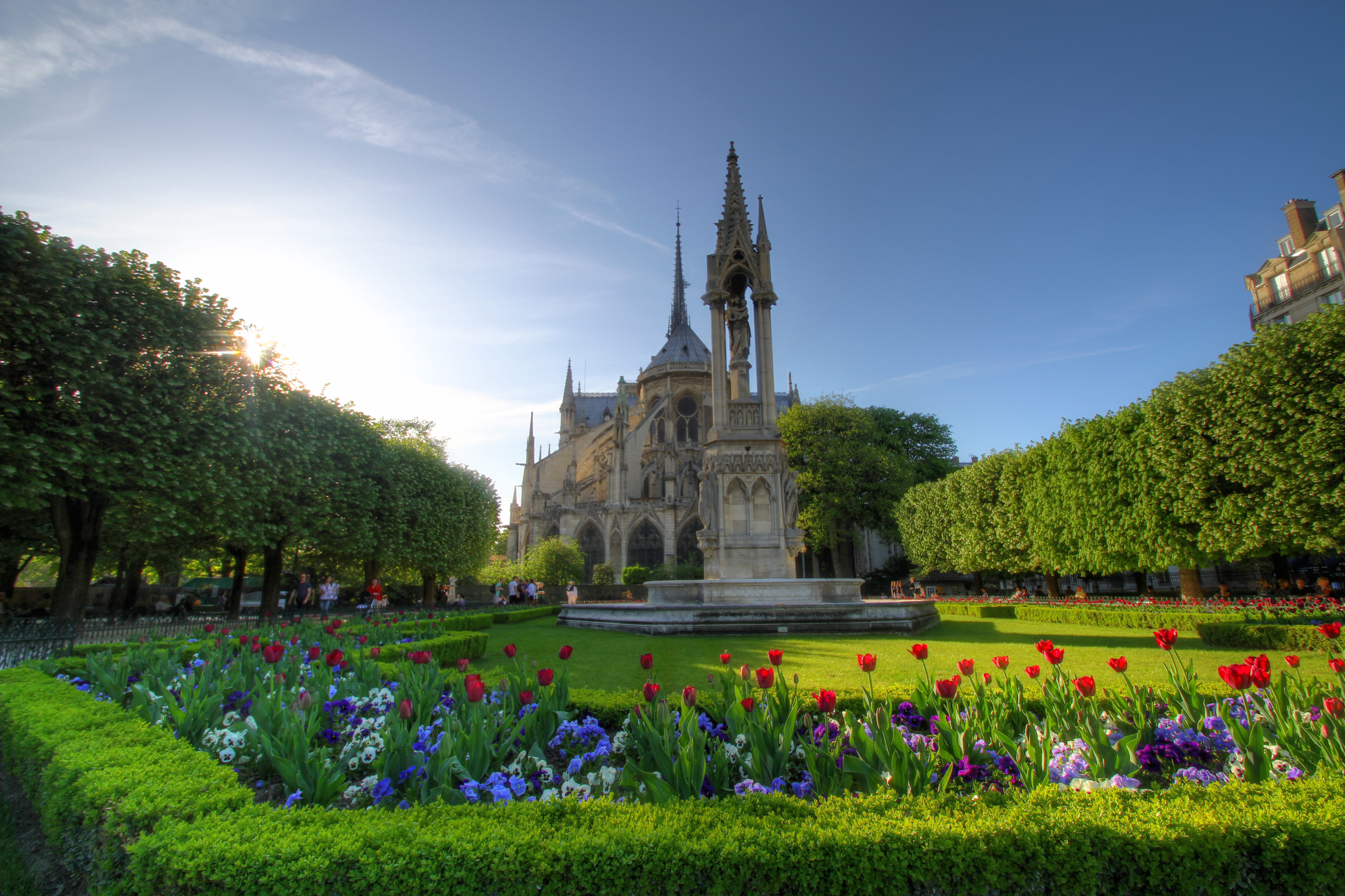 La cathédrale Notre-Dame de Paris vue du square Jean-XXIII